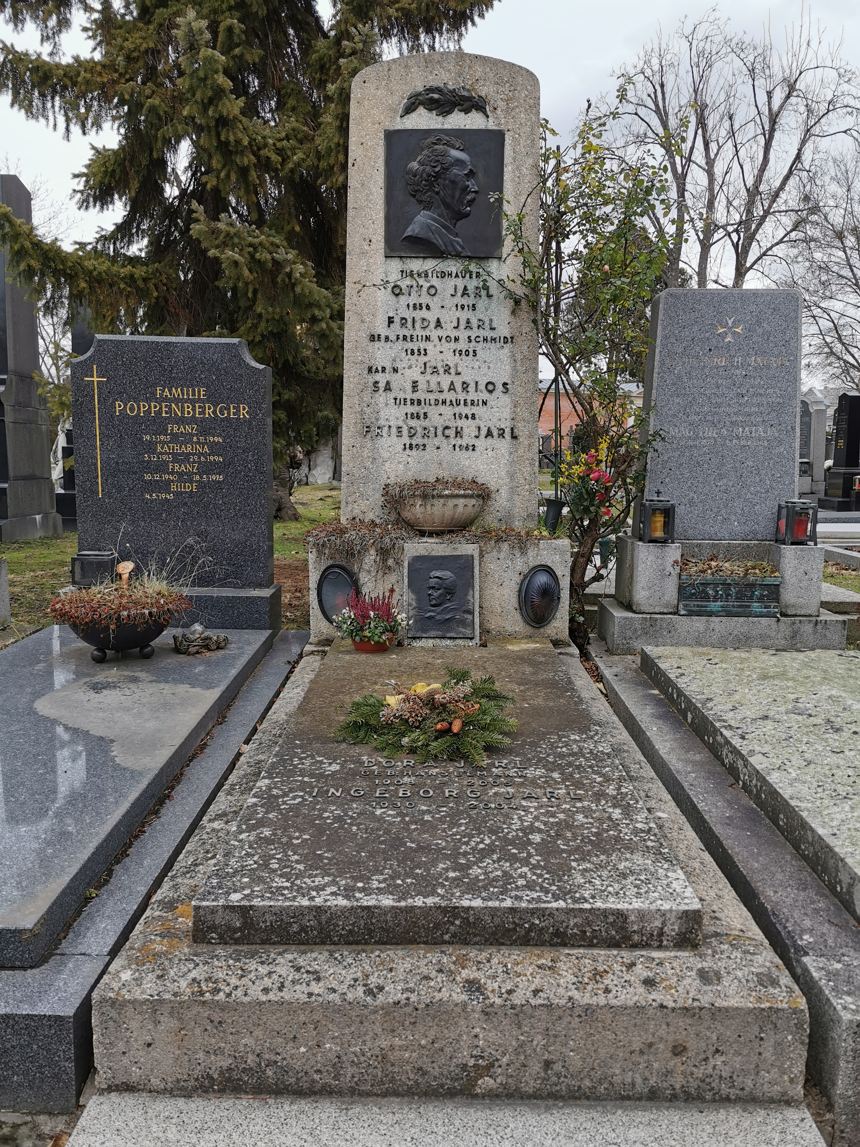 Grab von Otto Jarl auf dem Wiener Zentralfriedhof